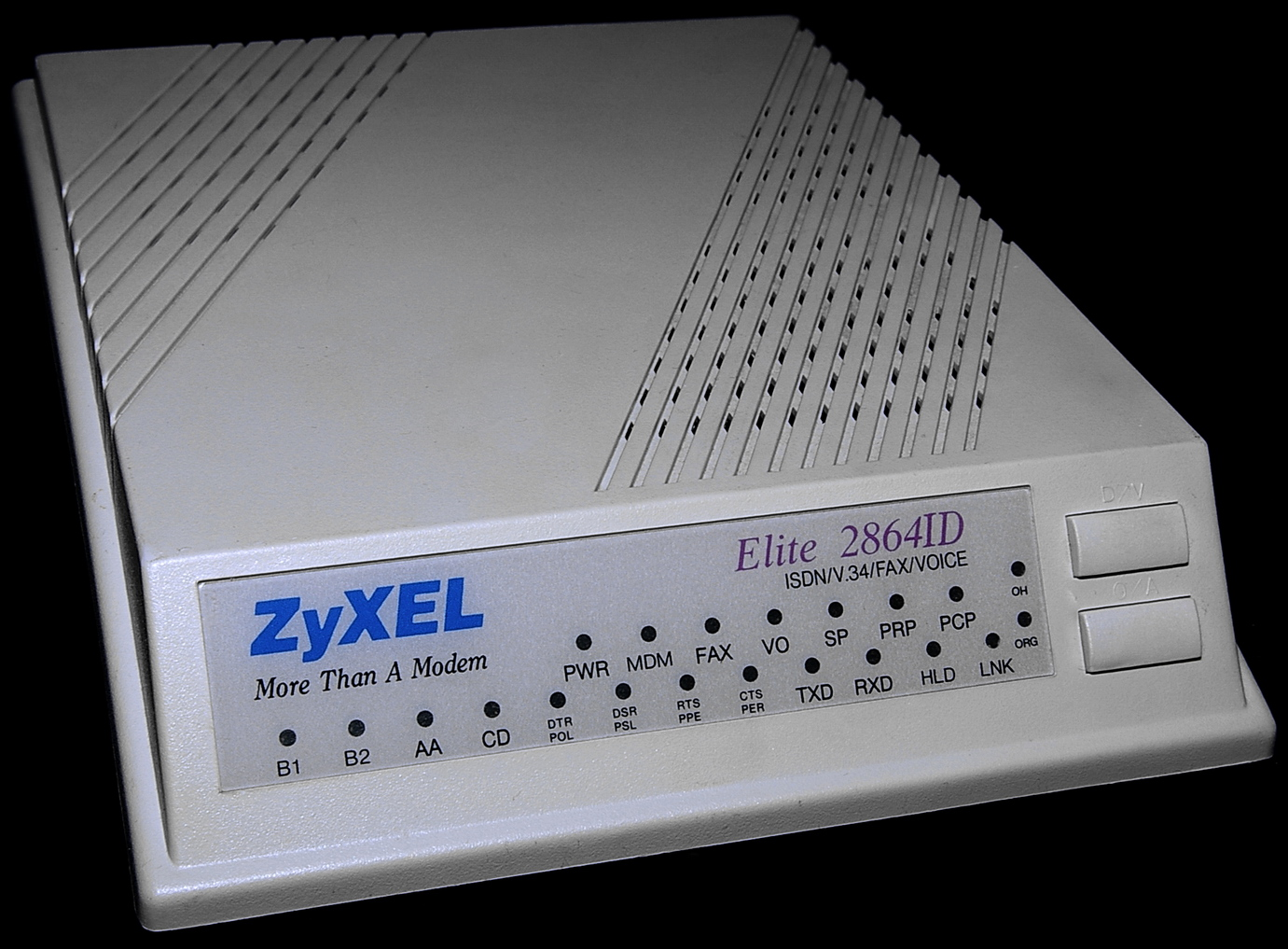 Modem Elite 2864ID von ZyXEL für ISDN und V.34, inkl Voicemail und Fax, ca. Baujahr 1995 Sonstiges: Gerät im Eigentum des CCC Köln